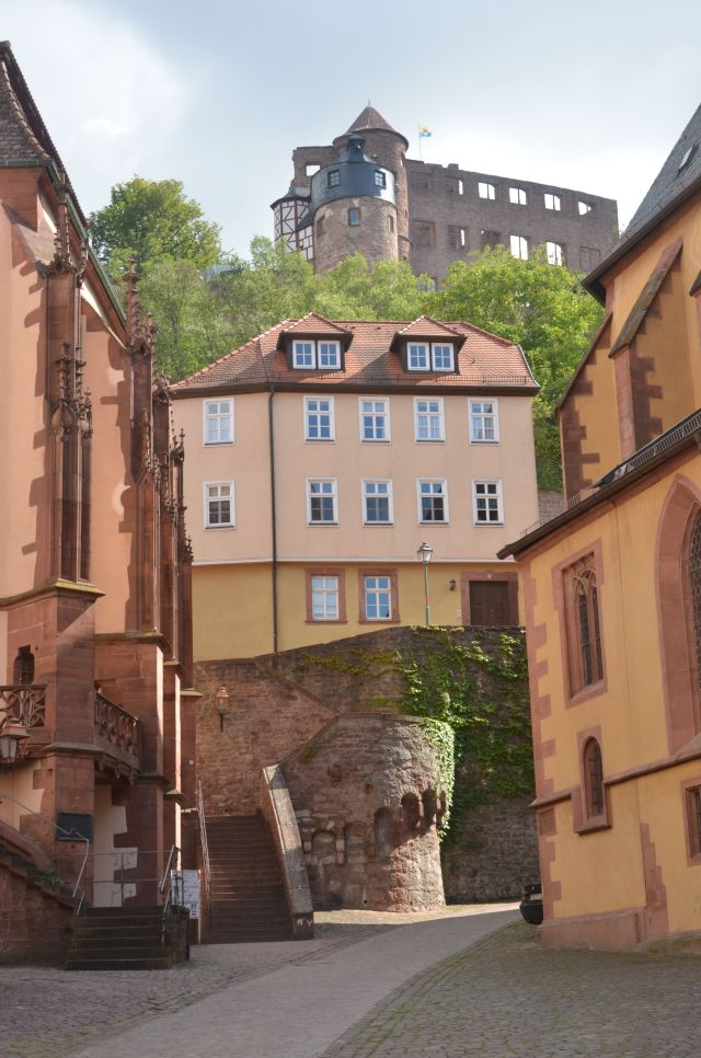 Blick der Altstadt sowie auf die Burg in Wertheim